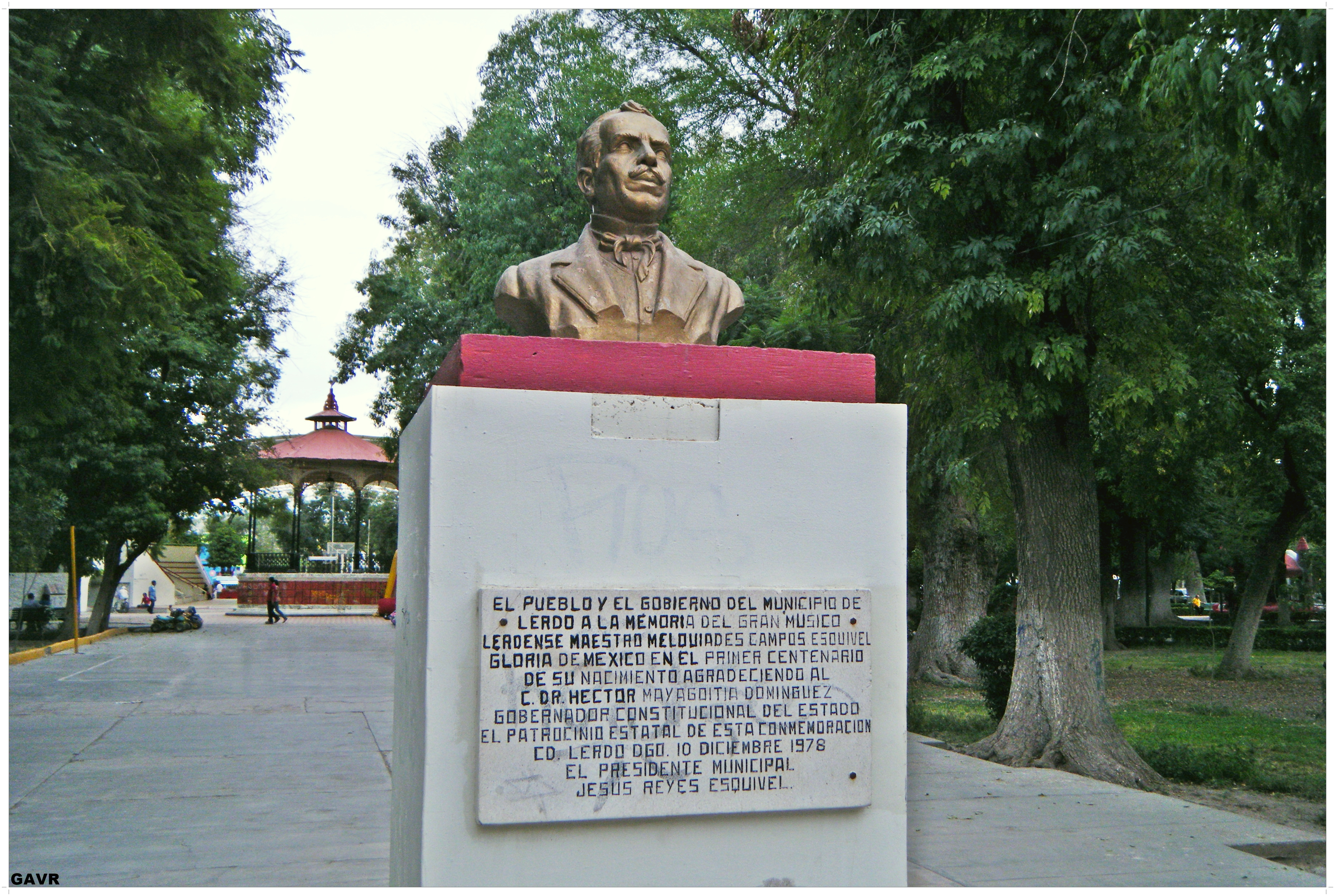 estatua en lerdo